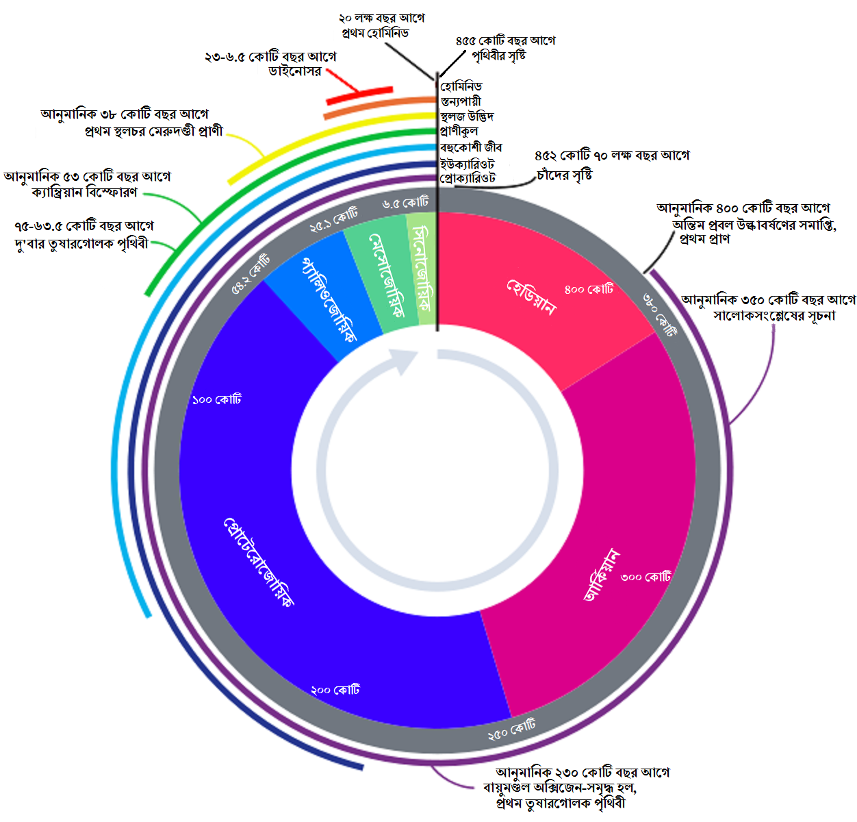 পৃথিবীর সাড়ে চারশো কোটি বছরের ইতিহাসকে ঘড়ির আকারে প্রদর্শন; উপরের মাঝখানের দাগটার ডানদিকে পৃথিবীর জন্ম থেকে সময় গণনা শুরু হচ্ছে আর ঘড়ির কাঁটার গতির অভিমুখে ঘুরে এই সময়-সারণী শেষ হচ্ছে ঐ একই দাগের বাঁ দিকে, প্রথম হোমিনিডের আবির্ভাবের মাধ্যমে।